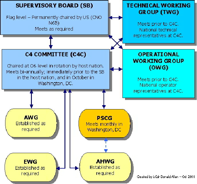 AUSCANZUKUS Structure